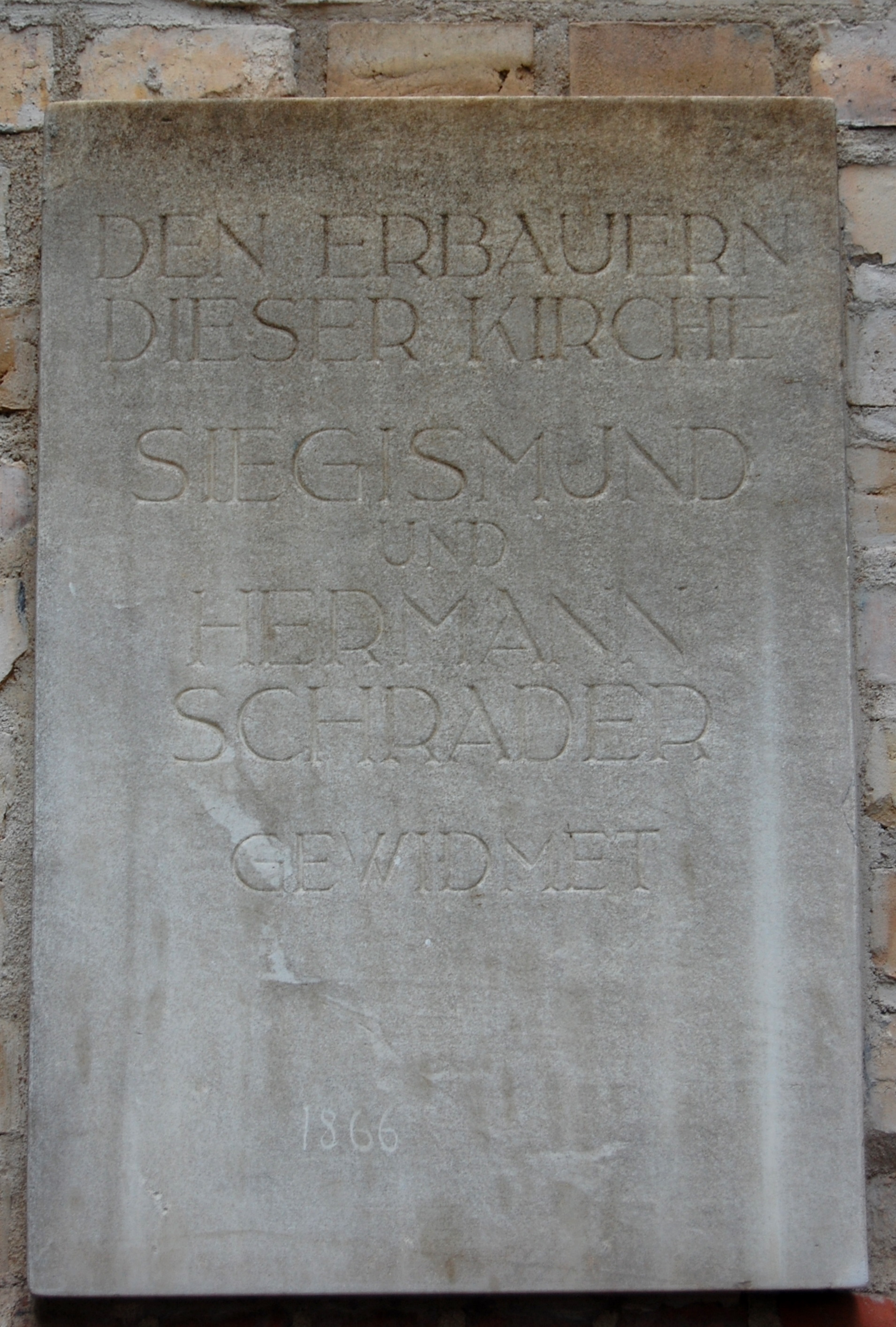 Widmung für die Baumeister der Sankt-Gertraud-Kirche in Salbke